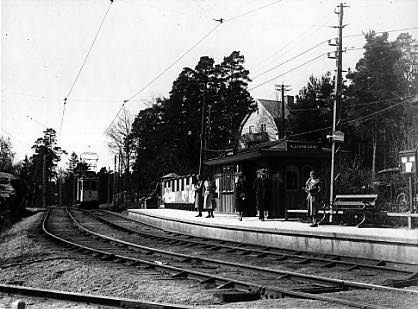 Ålstens Gård, Ålsten, Bromma. Ålstens Gård, spårvagnshållplats, foto från 1931.(rälsen i bildens nedre vänstra hörn leder in på vändslingan) Fotonummer SM 2030-85. Publiceat av Spårvägsmuseet.